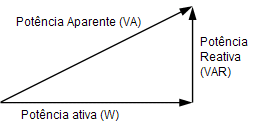 Triângulo de potência